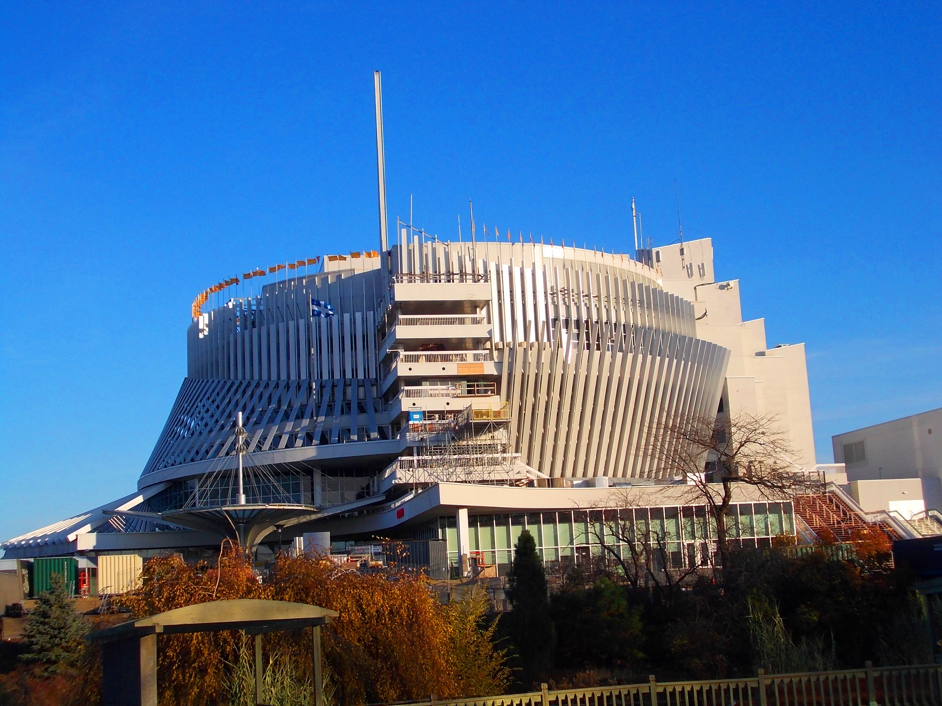 Casino de Montréal